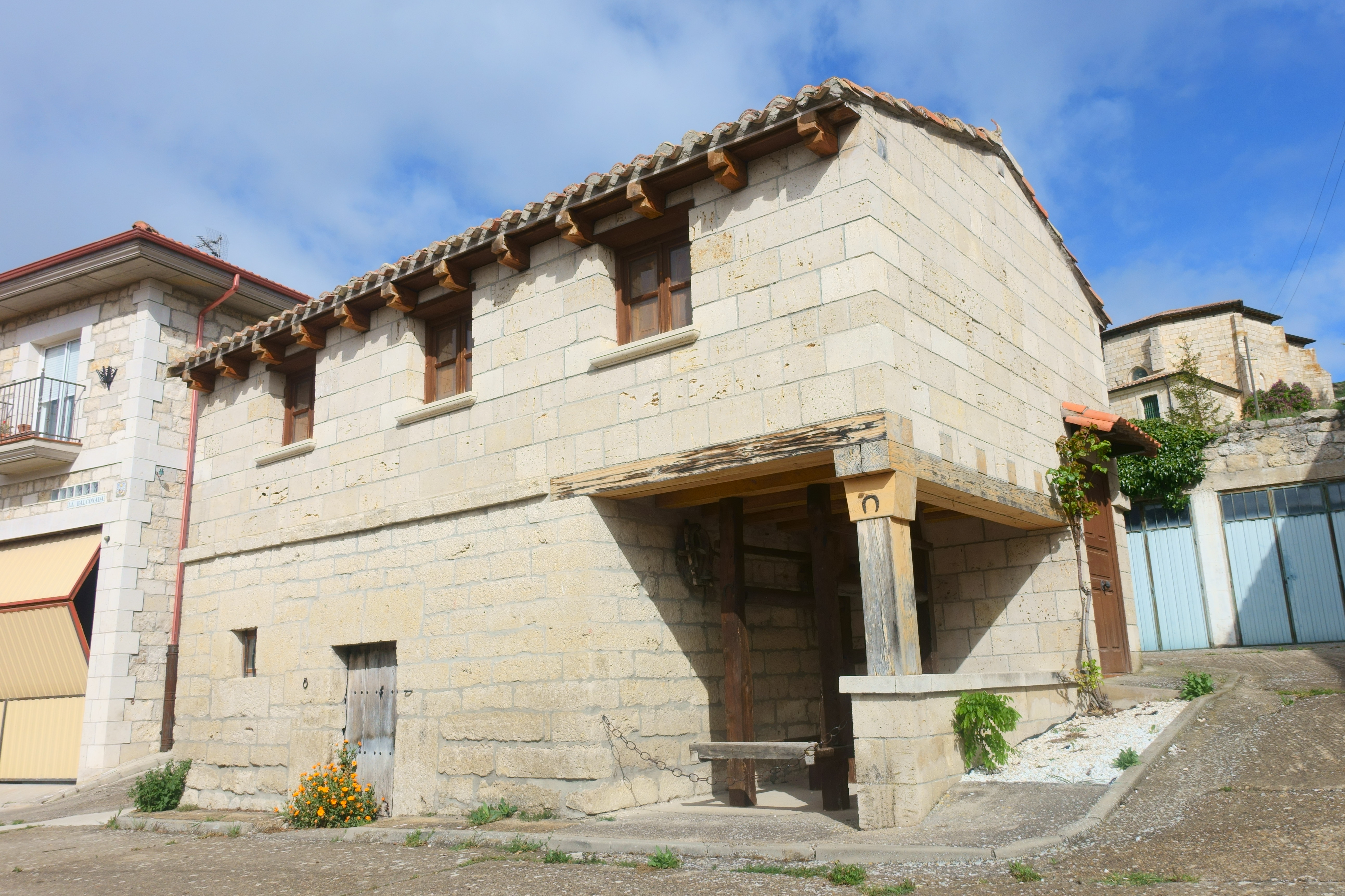 Museo etnográfico en Susinos del Páramo (Burgos, España).